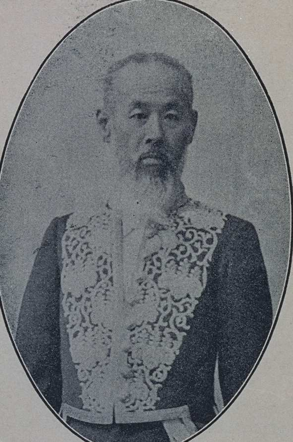 本居豊穎（1834～1913）